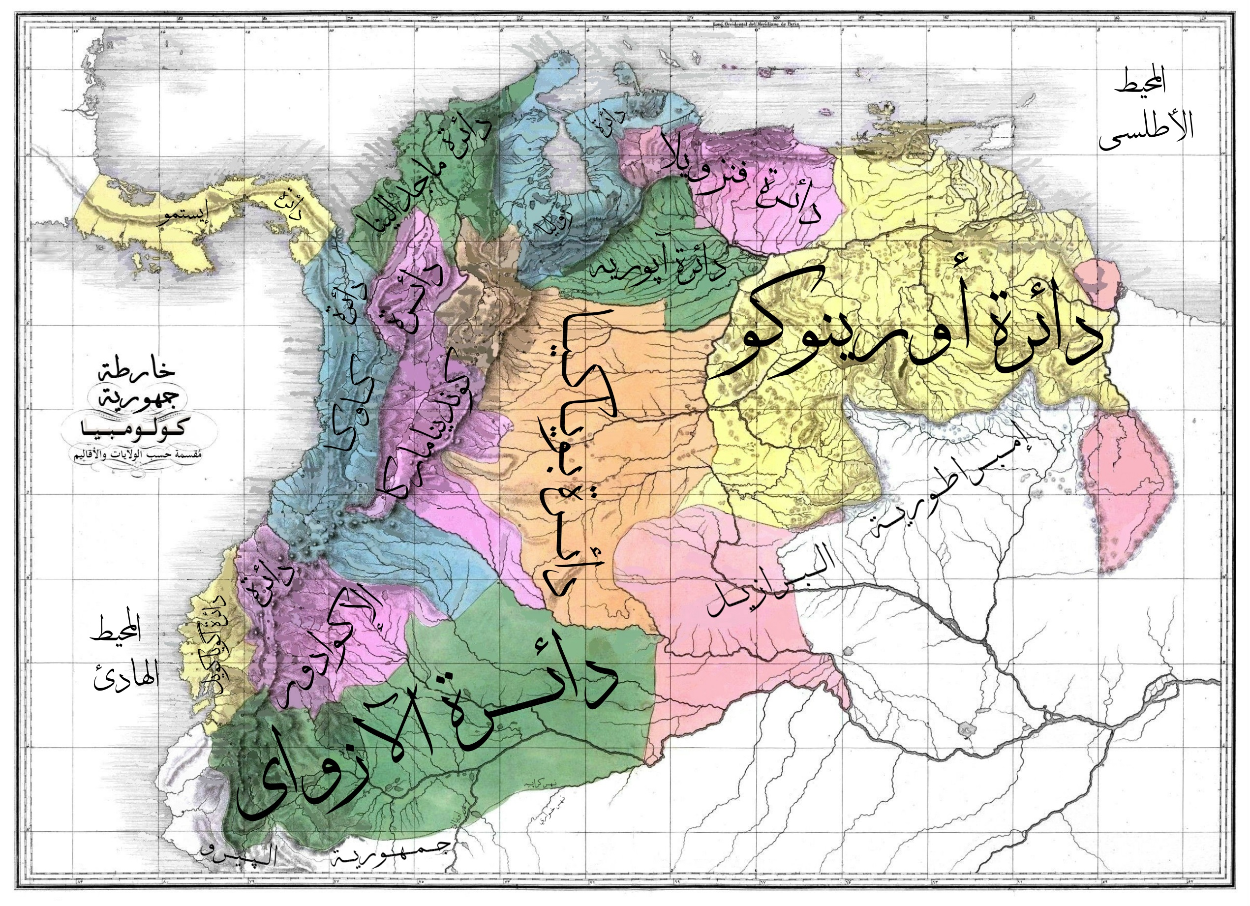 خارطة كولومبيا الكُبرى.